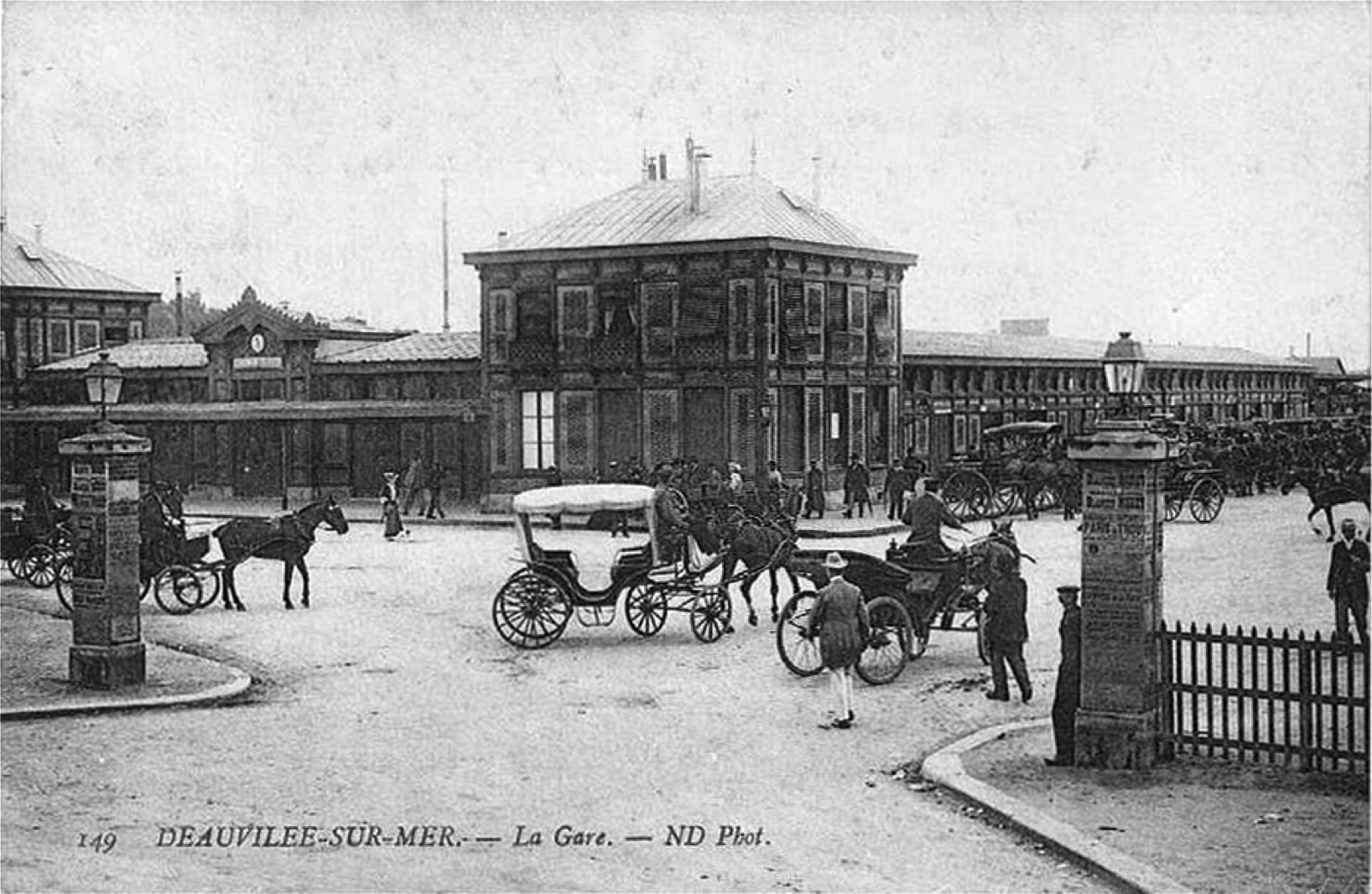 Au début des années 1900, la première gare de Deauville.